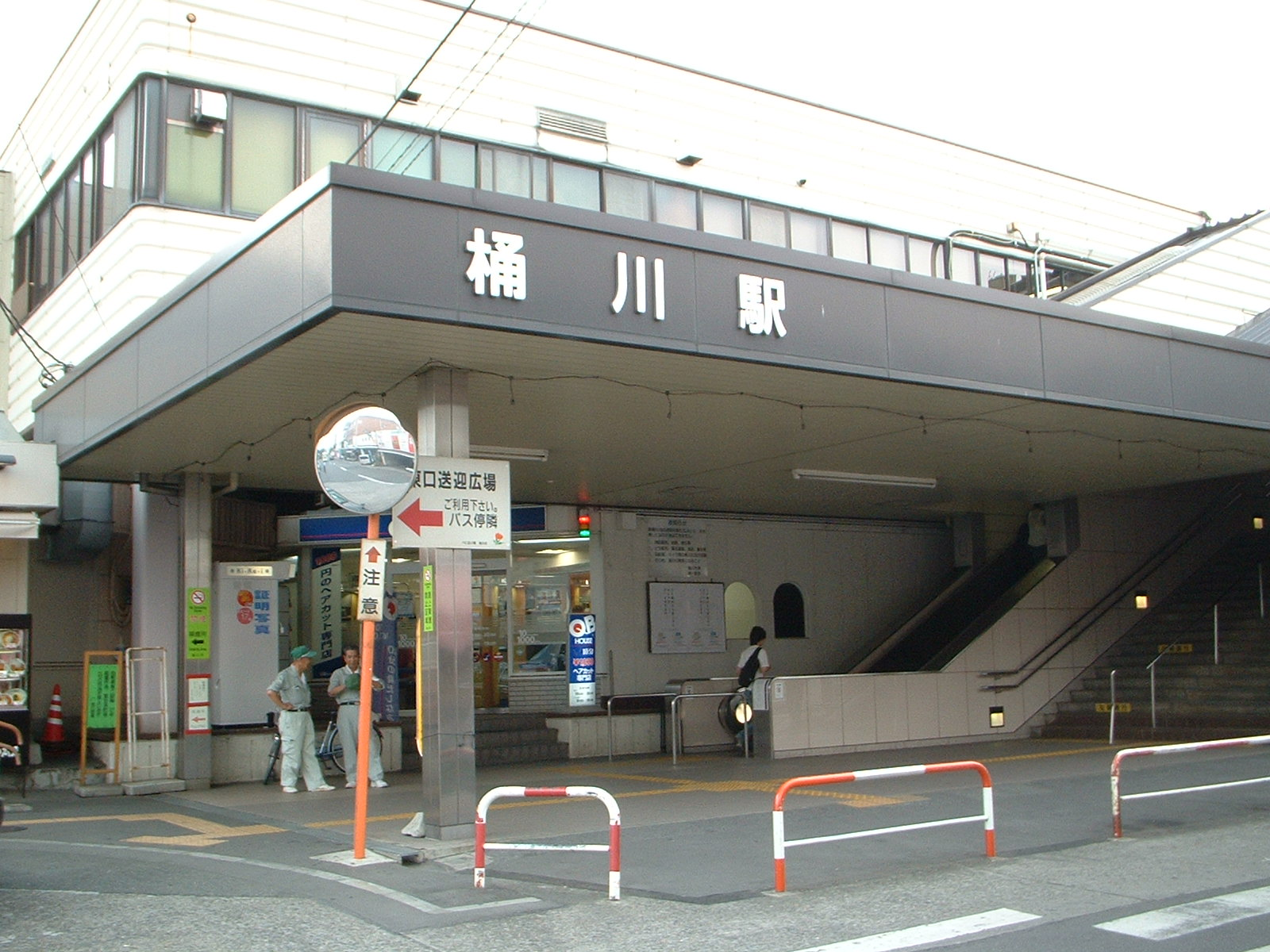 桶川駅の東口